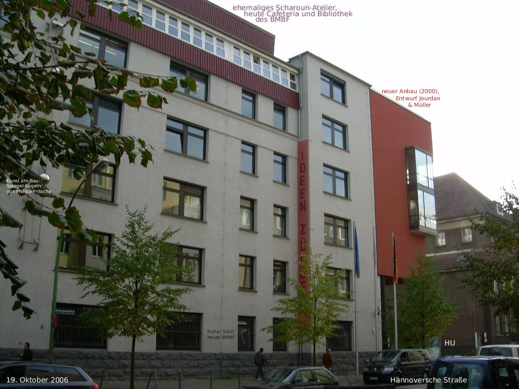 Ehemalige Ständige Vertretung der BRD bei der DDR, heute BMWi, Hannoversche Straße 28-30, Berlin-Mitte